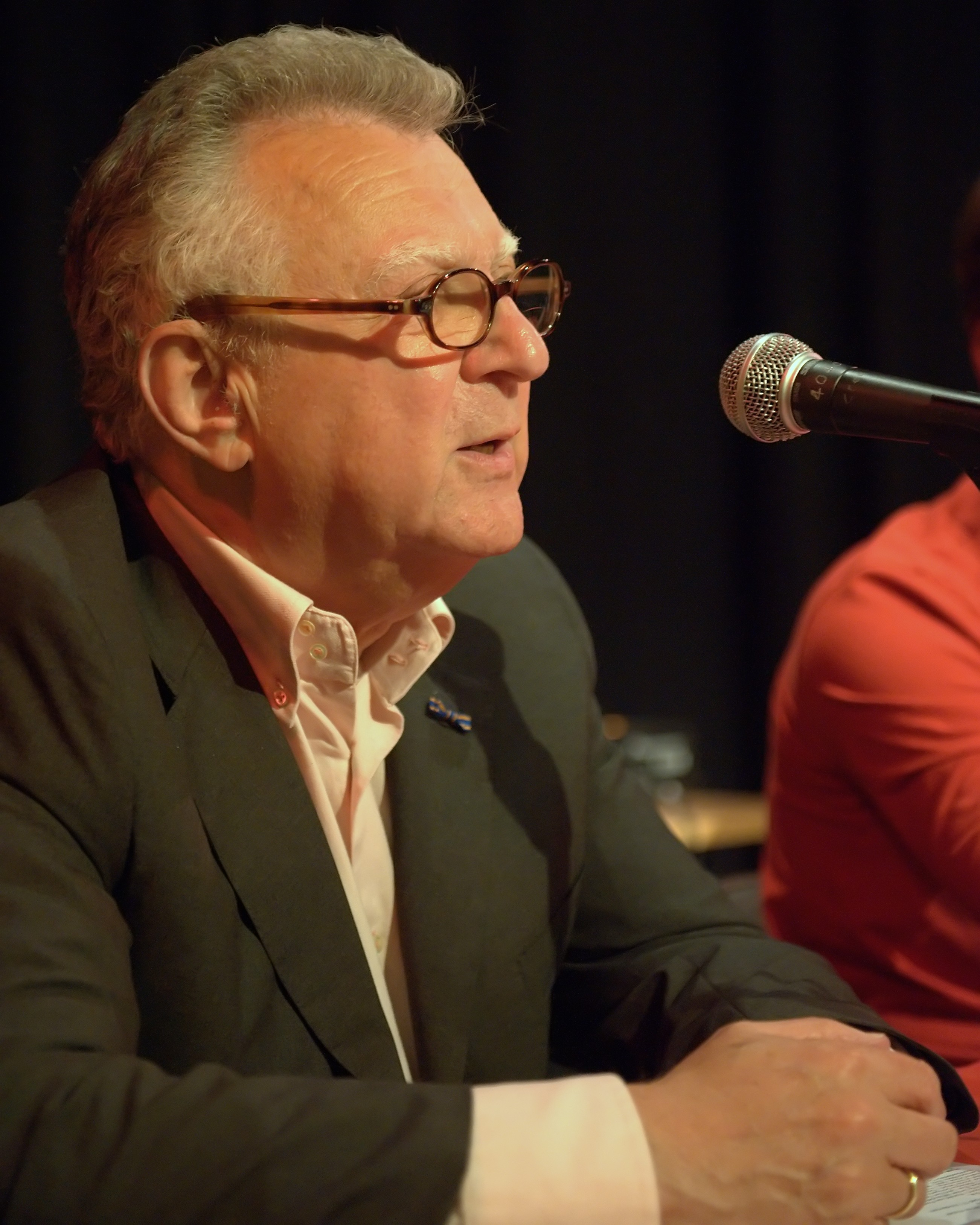 Arnold Heertje, econoom